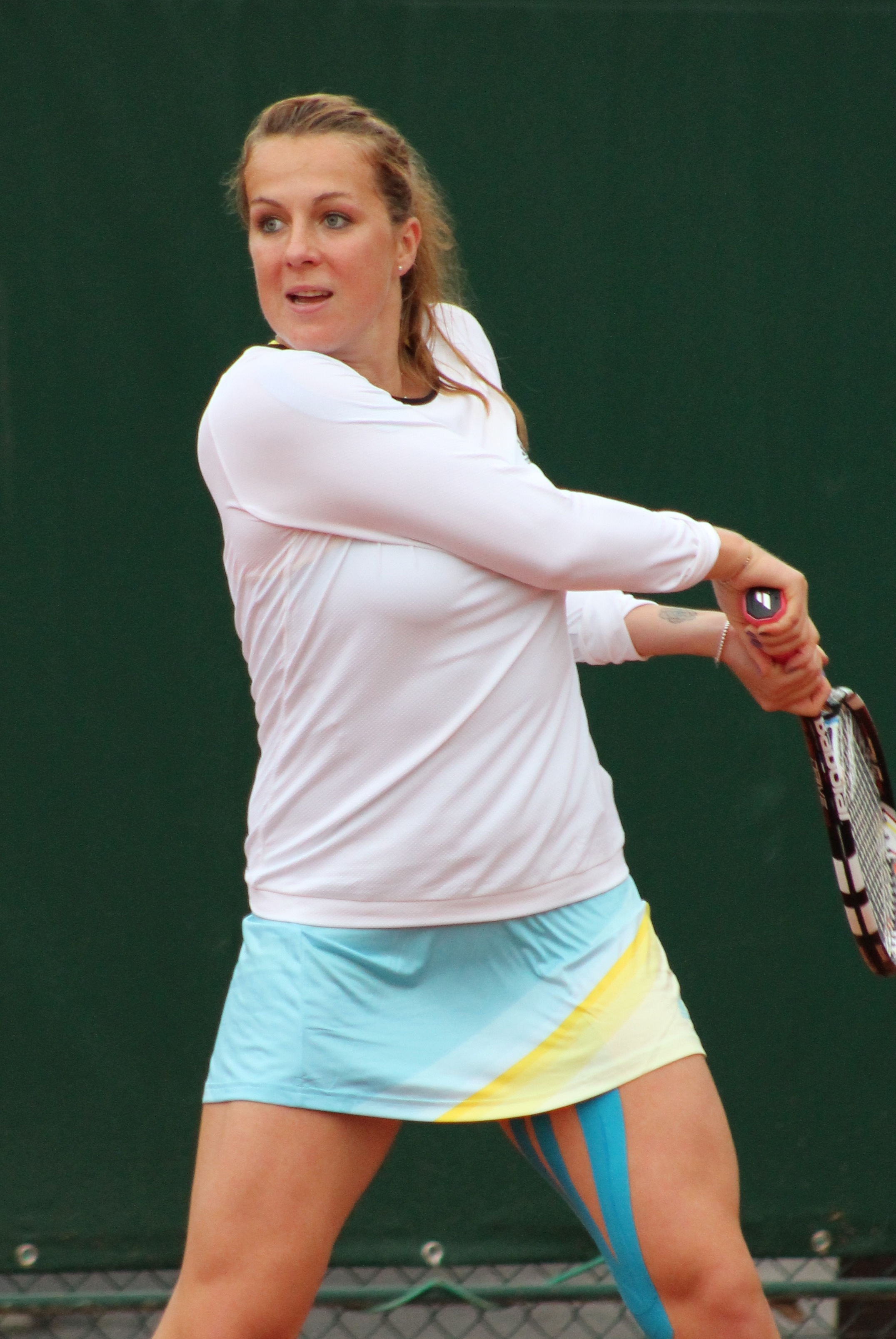 Pavlyuchenkova RG13 (13)